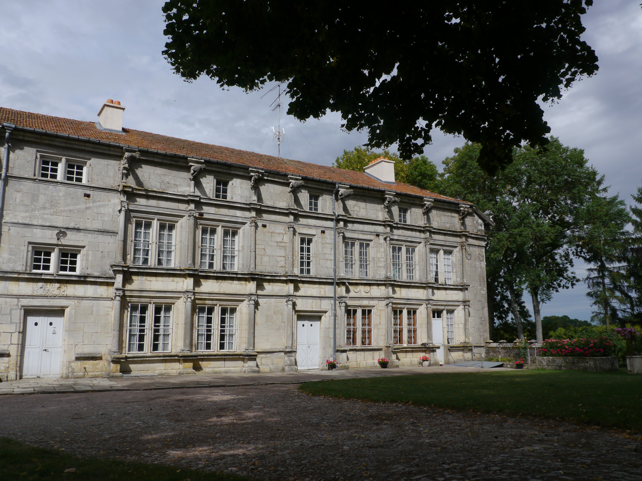 Façade Renaissance du château d'Étreval, édifiée vers 1533 par François de Tavagny